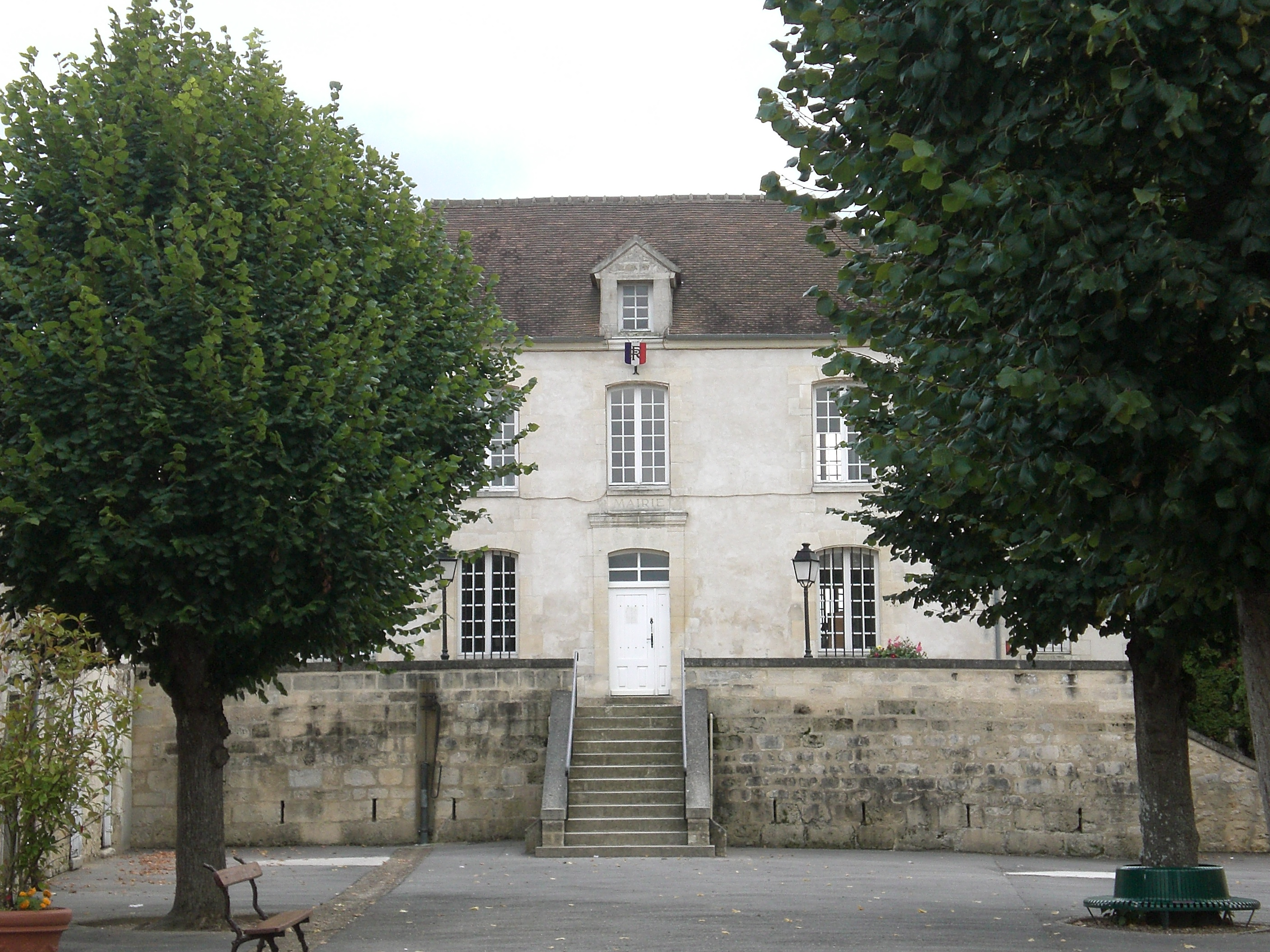 mairie de belle-église oise france